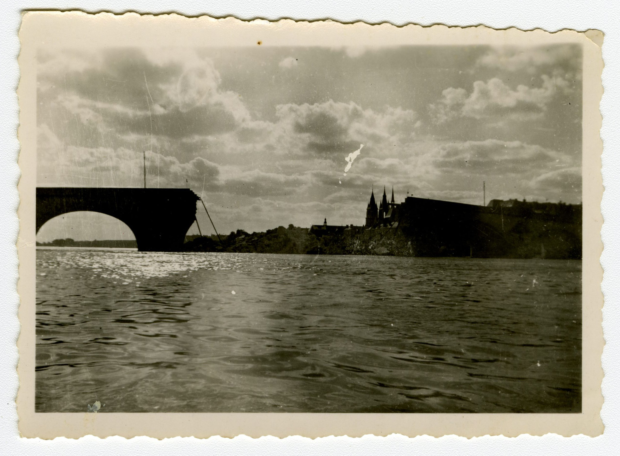 Pont Jacques-Gabriel après la destruction des arches centrales le 16 août 1944 par les troupes allemandes en retraite (photo prise avant la reconstruction en 1946)